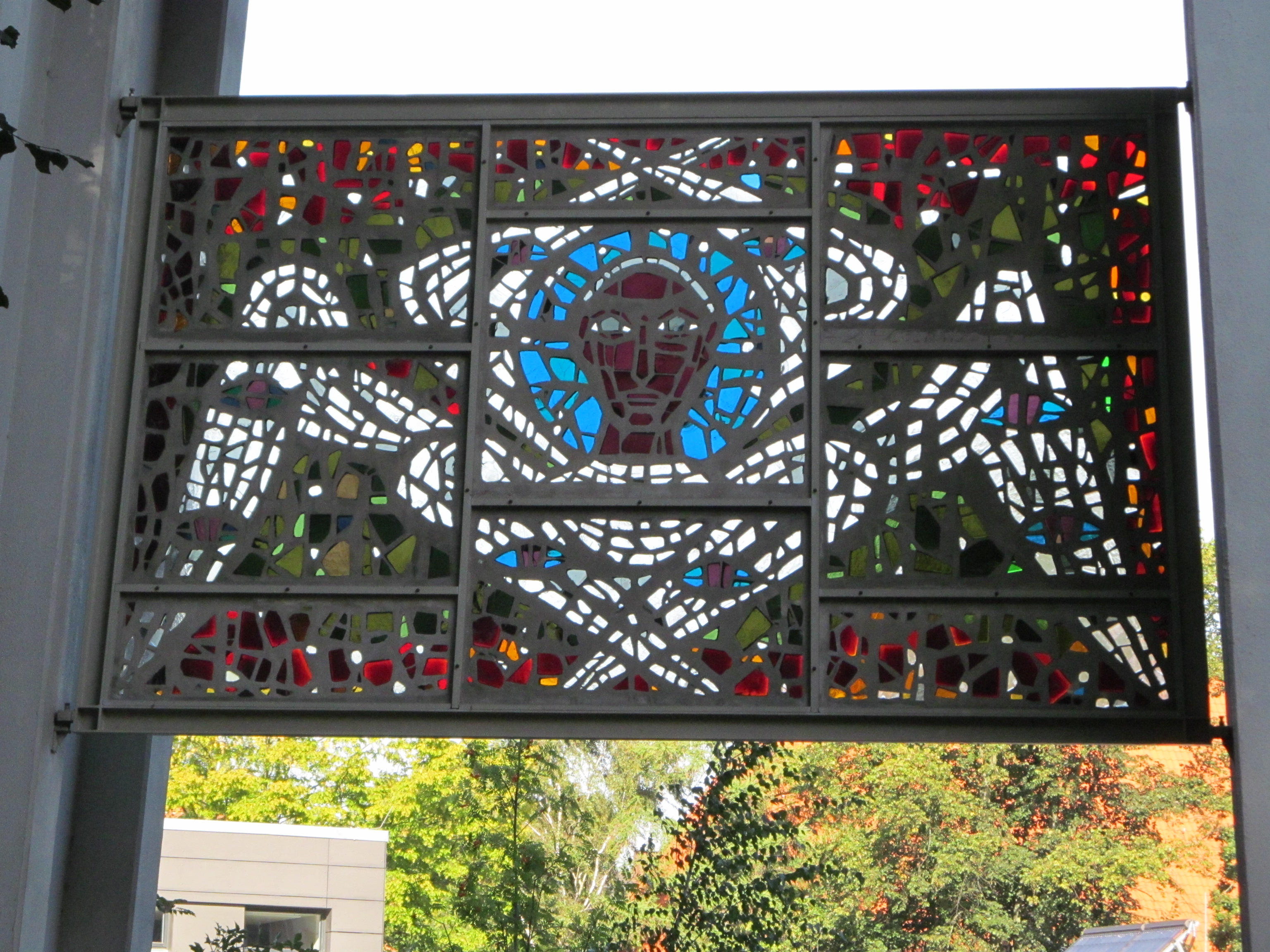 Dreifaltigkeitskirche Hamburg-Hamm, Glasfenster von Claus Wallner im Turm